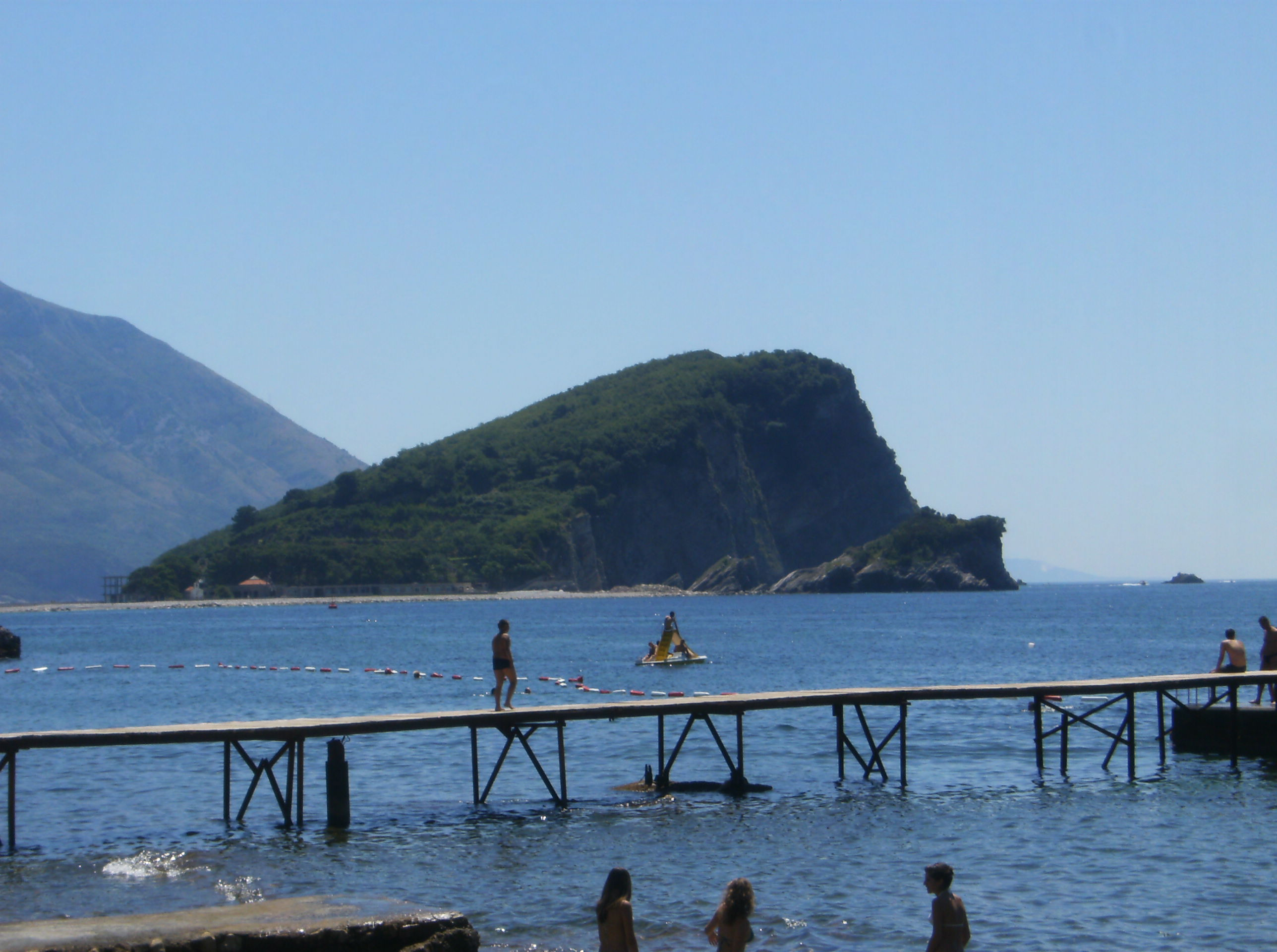 Острів святого Ніколи